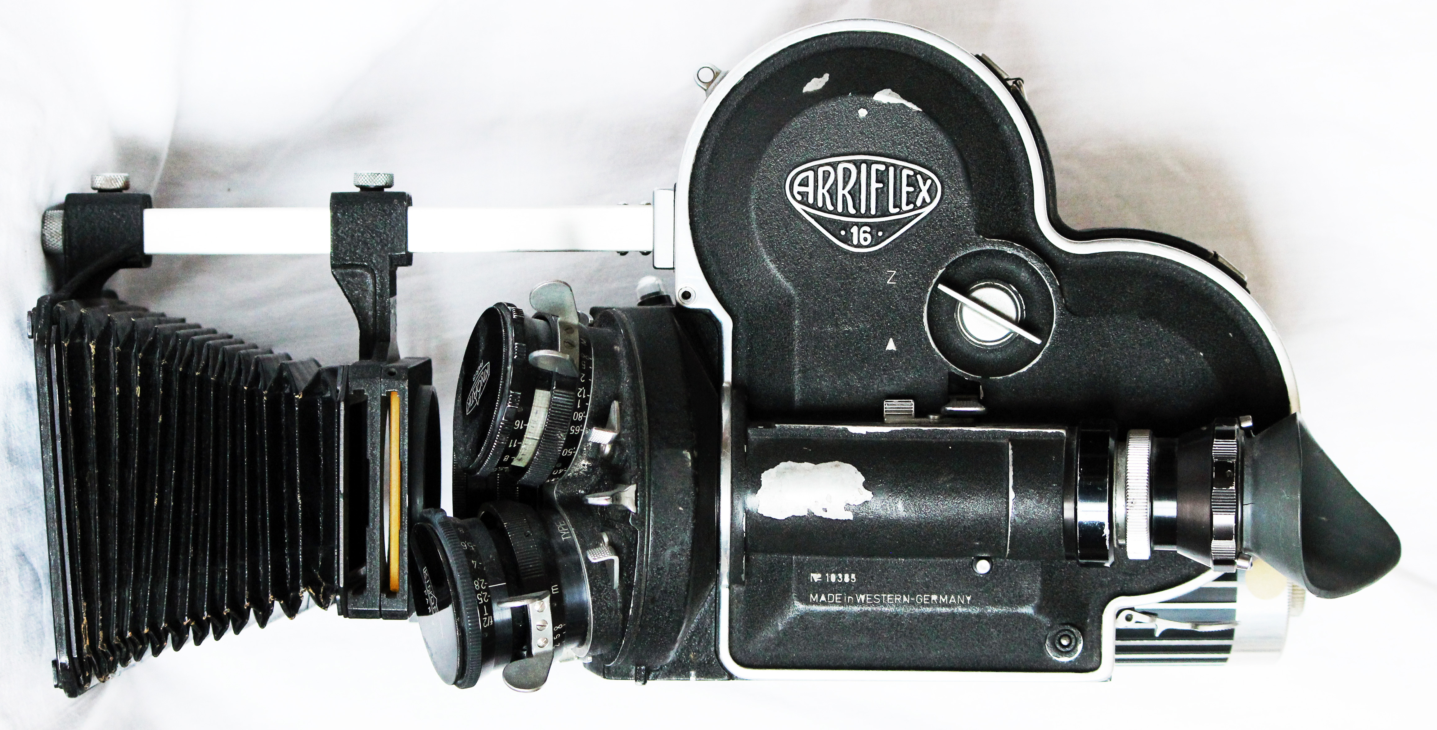 Caméra 16 mm Arriflex 16 ST avec objectifs Kinoptik